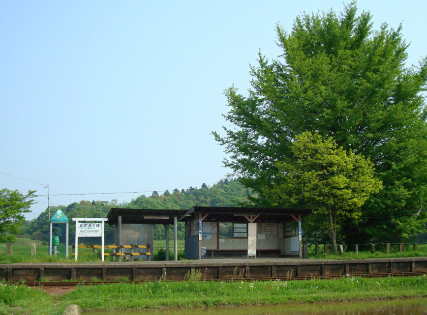 Kazusa-Kubo Station on the Kominato Line, Ichihara, Chiba, Japan